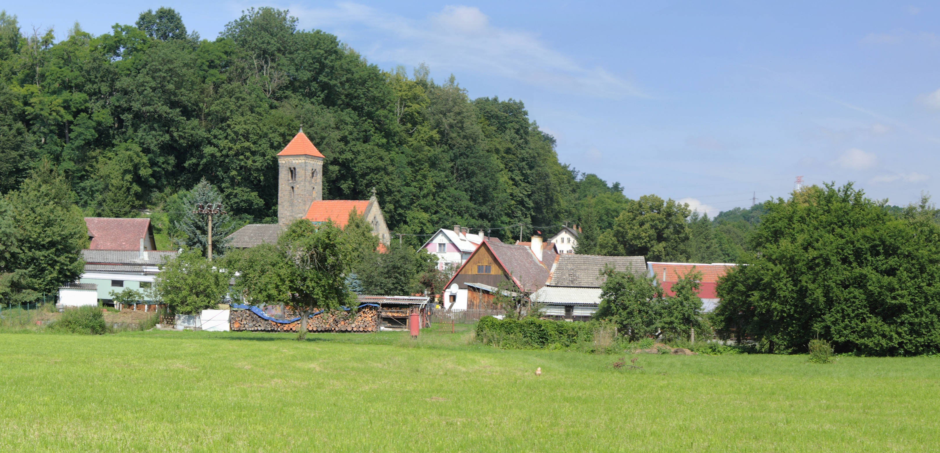 Mohelnice od soutoku Jizery a Mohelky